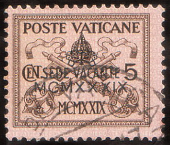 Почтовая марка Ватикана Sede Vacante («вакантного престола»), 1939